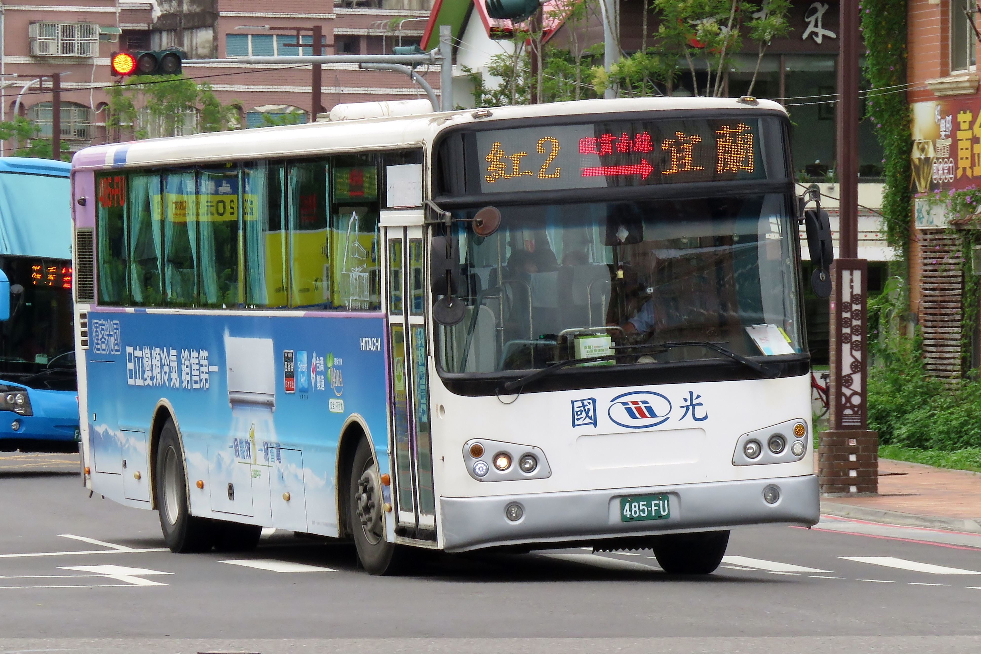 2010 Daewoo BC211MA 485-FU 紅2路 南方澳→宜蘭